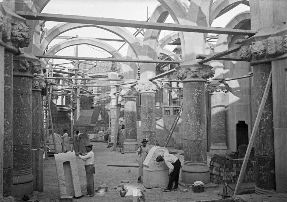 Imatge